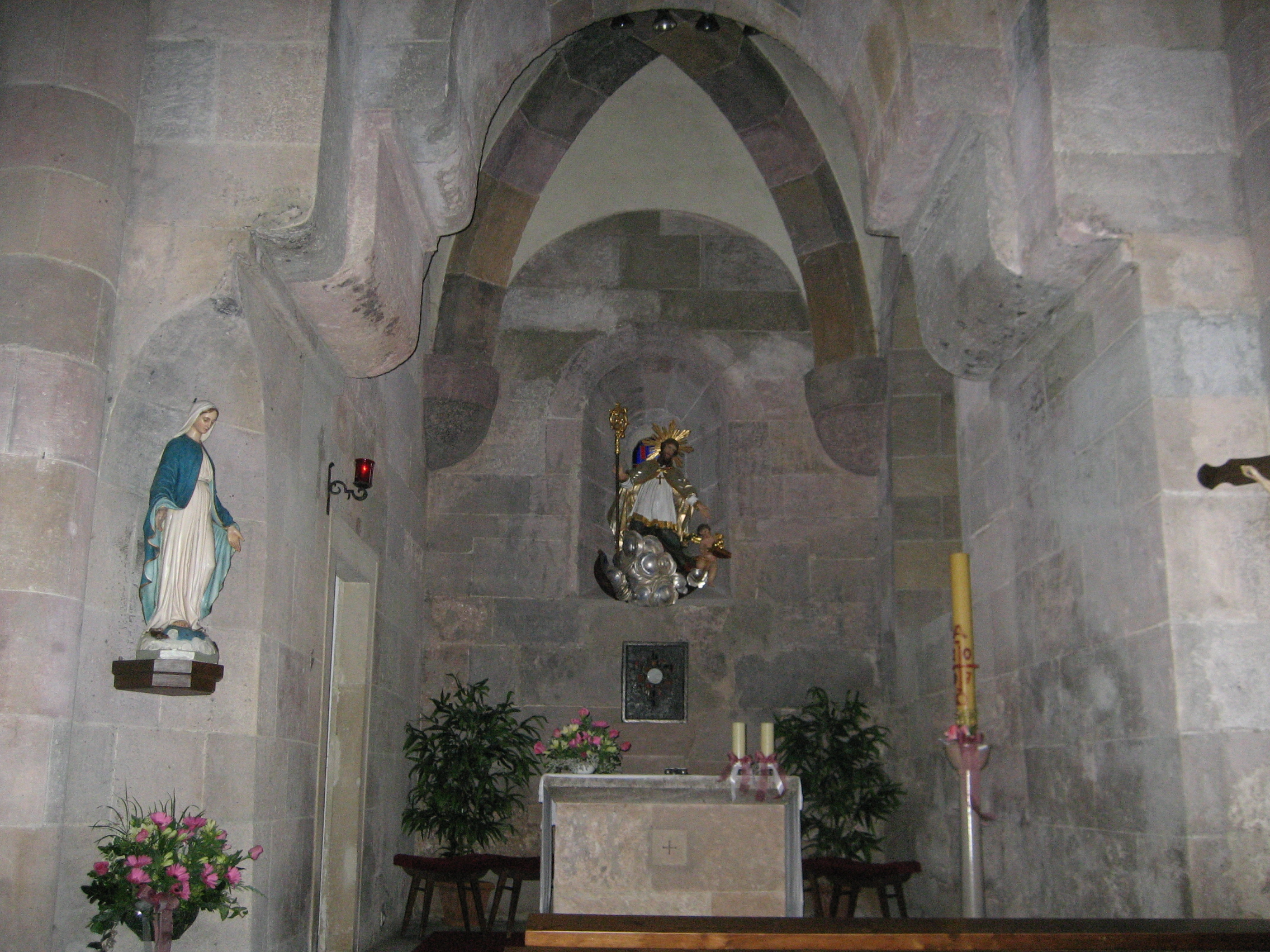 Kath. Filialkirche hl. Nikolaus